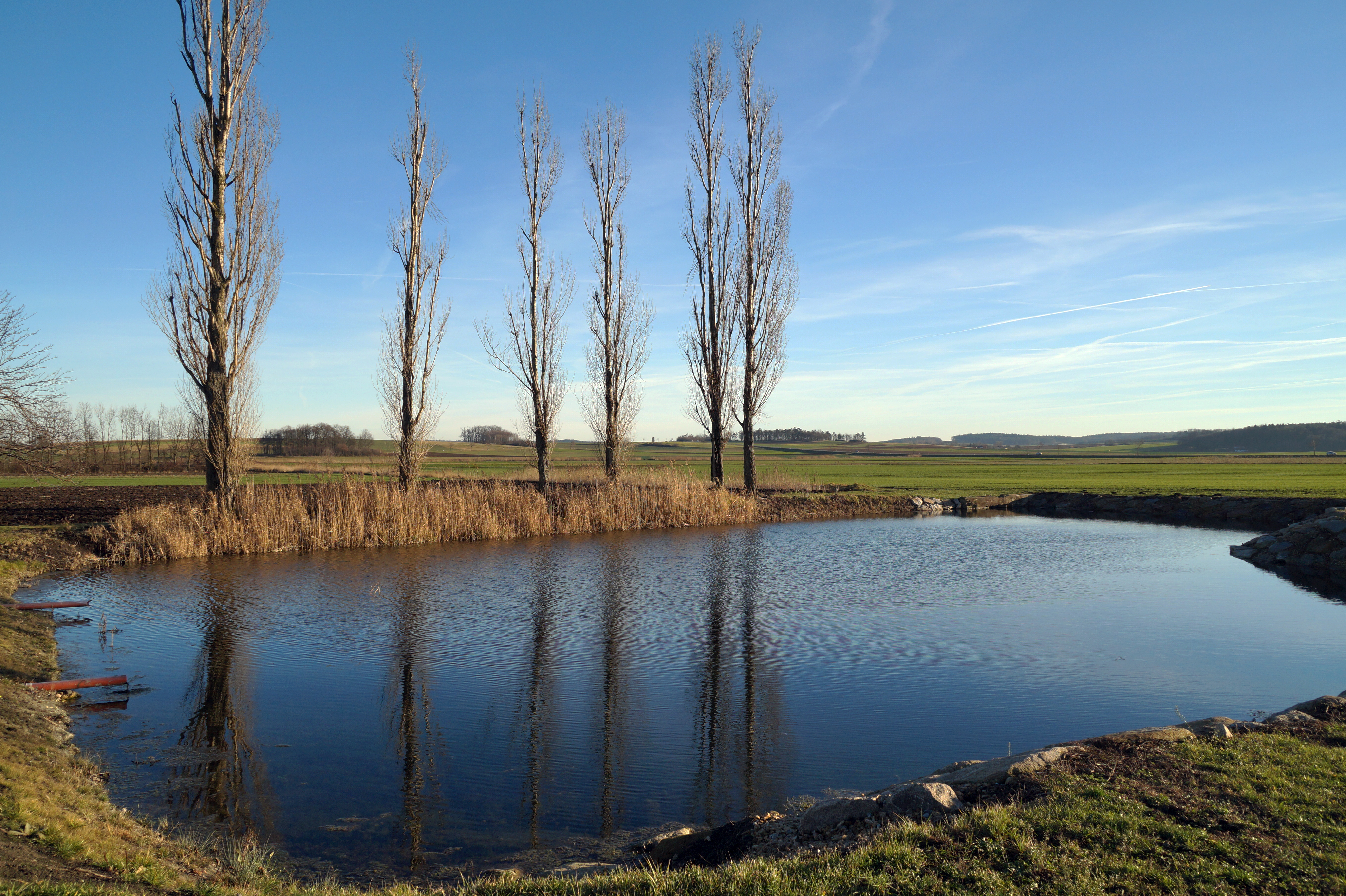 Schmida, Quelle - Dez.2015